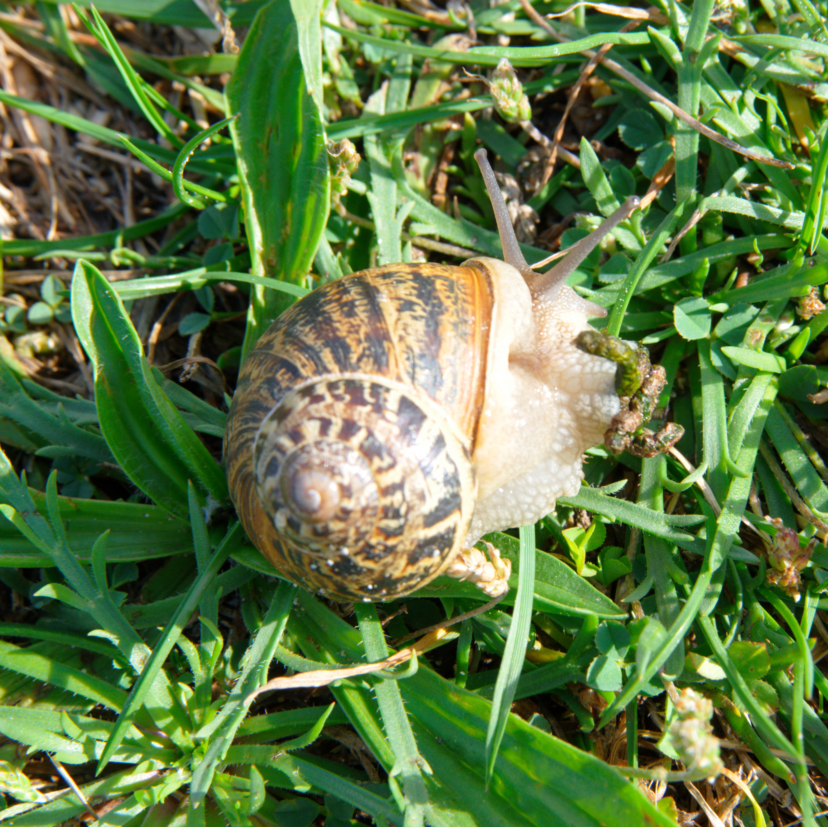 Schnecke mit Kot